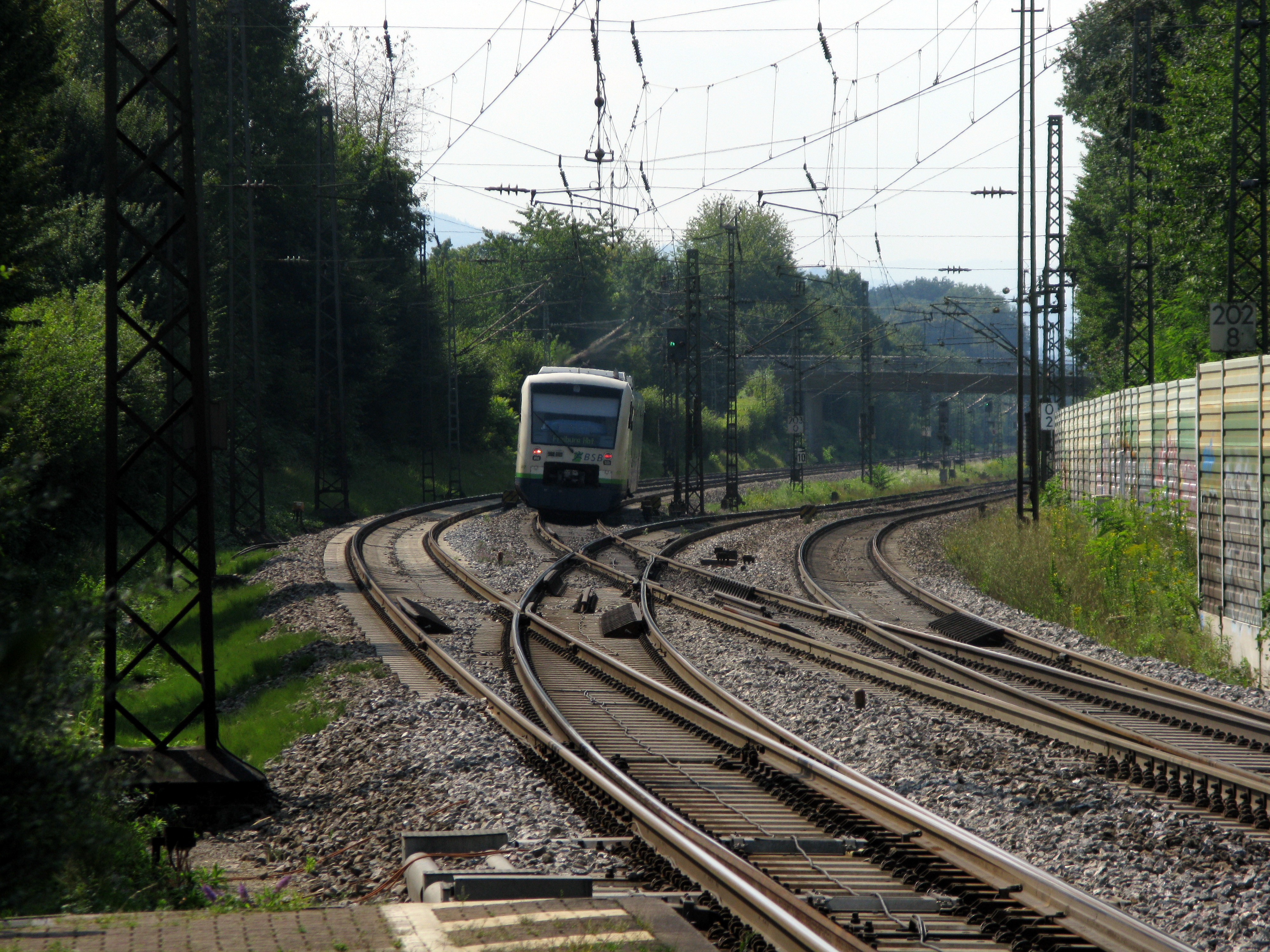 Abzweig der Güterumgehungsbahn Freiburg (rechts) von der Rheintalbahn bei Gundelfingen mit Breisgau S-Bahn in Fahrtrichtung Freiburg